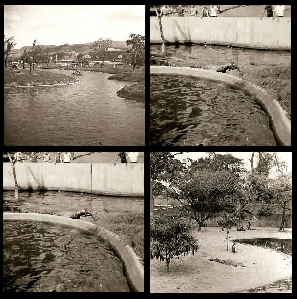 Parque Generalisimo Francisco de Miranda (Parque del Este) 1968 en Caracas - Venezuela